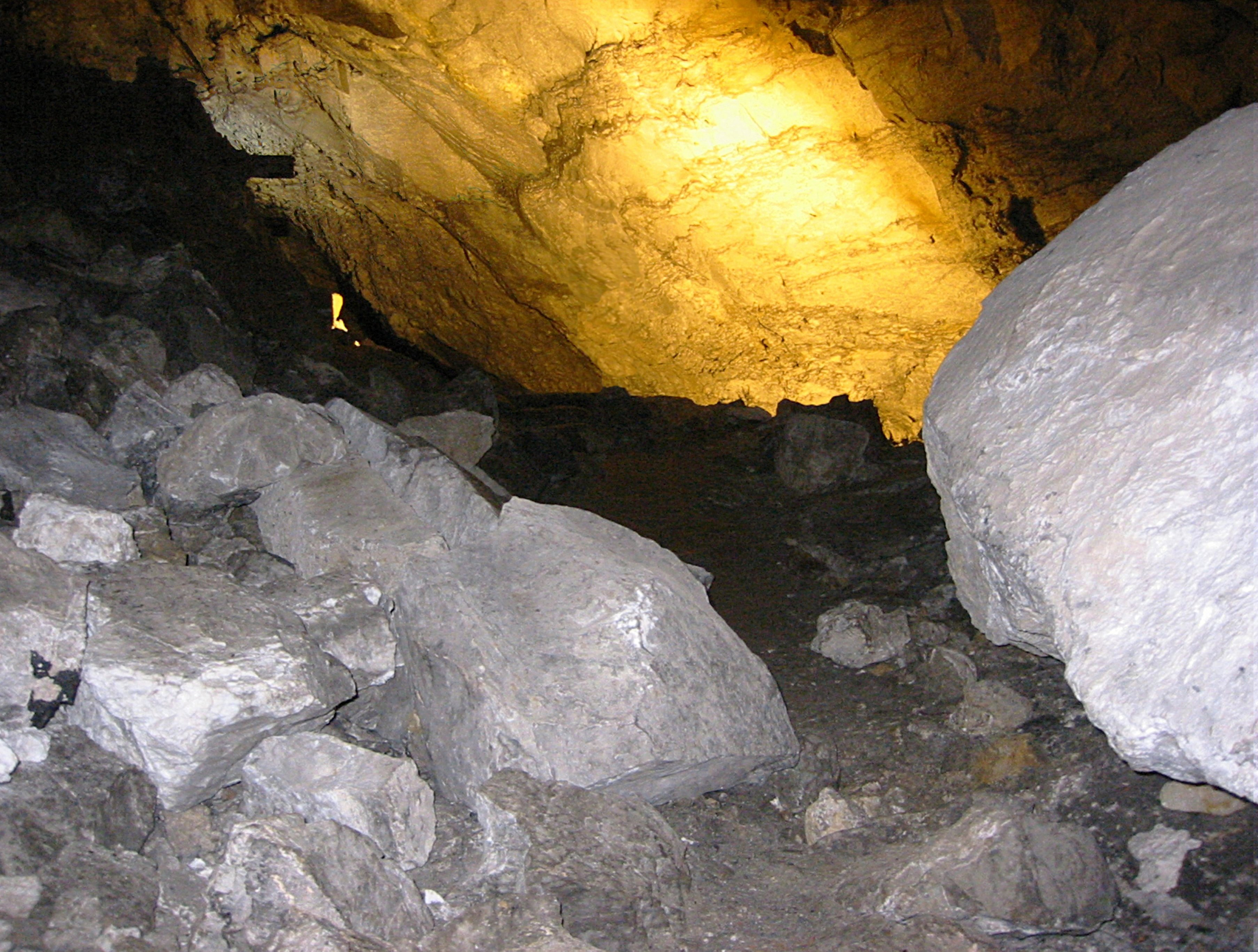 Halle von 182 m Länge und 15 m Höhe